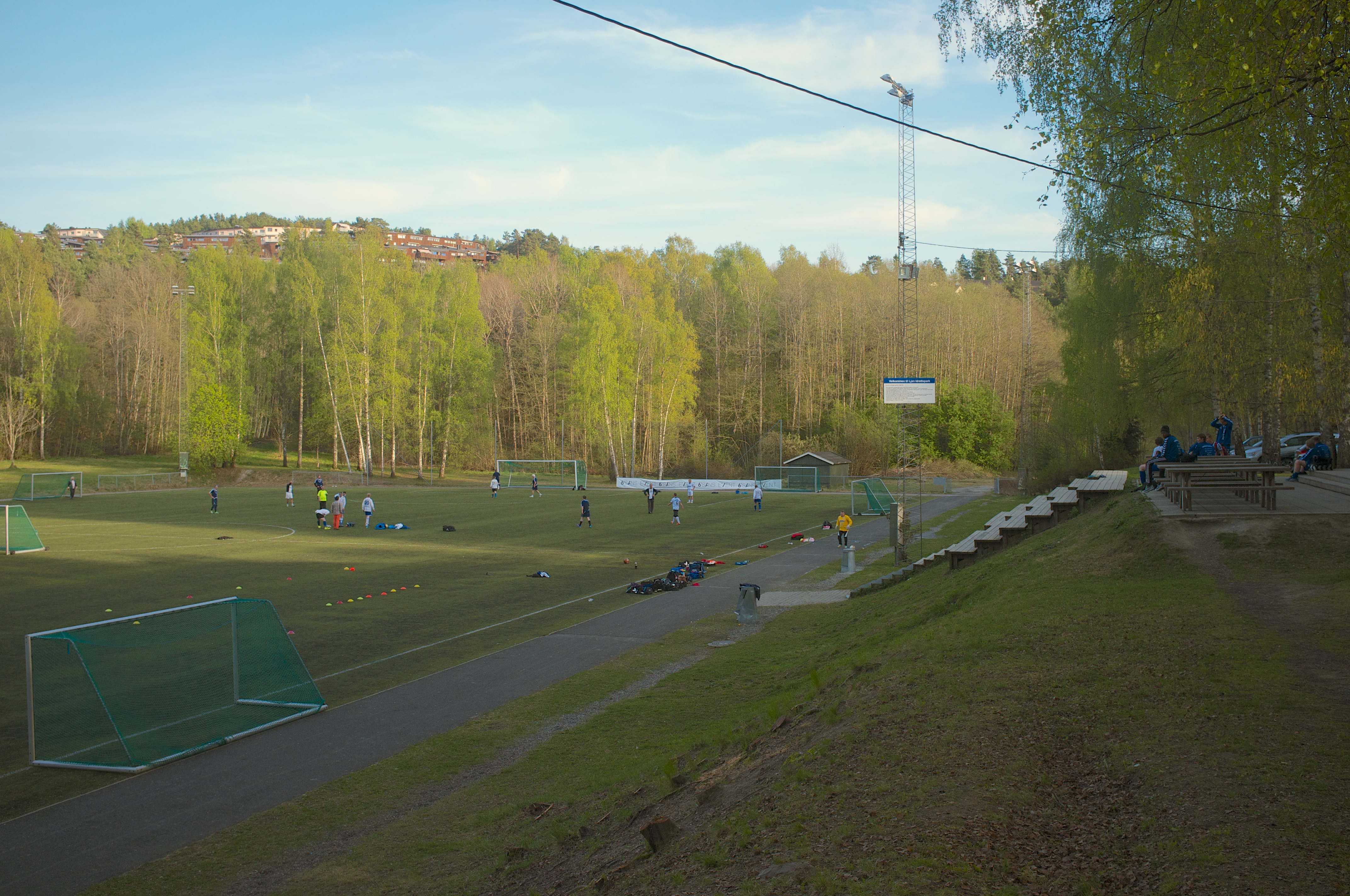 Hallager idrettsplass i Oslo.